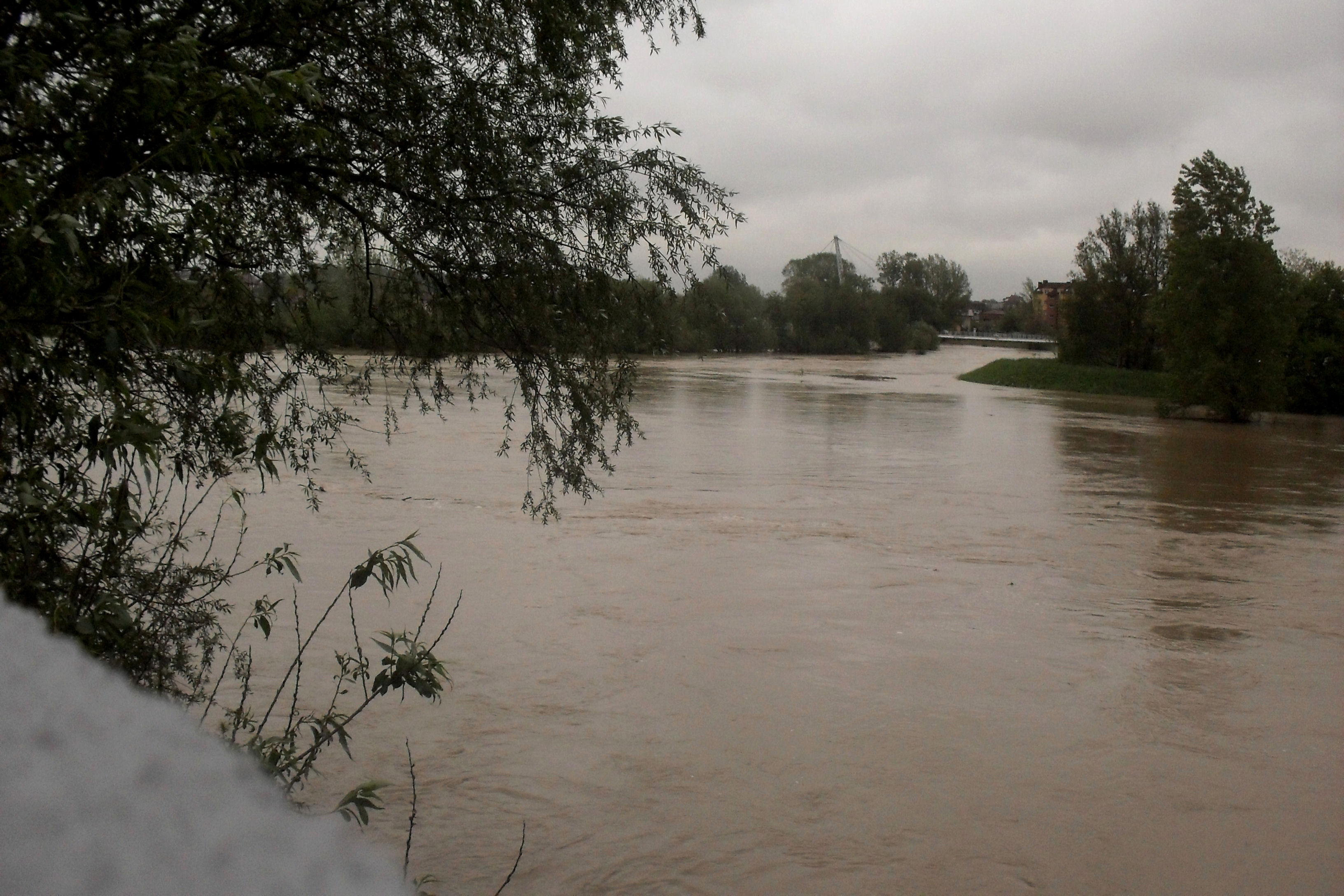 Wisłoka, miejsce ujścia Jasiołki. Efekt intensywnych opadów deszczu z 16 maja 2010. Data wykonania: 17 maja 2010, około 16:45.